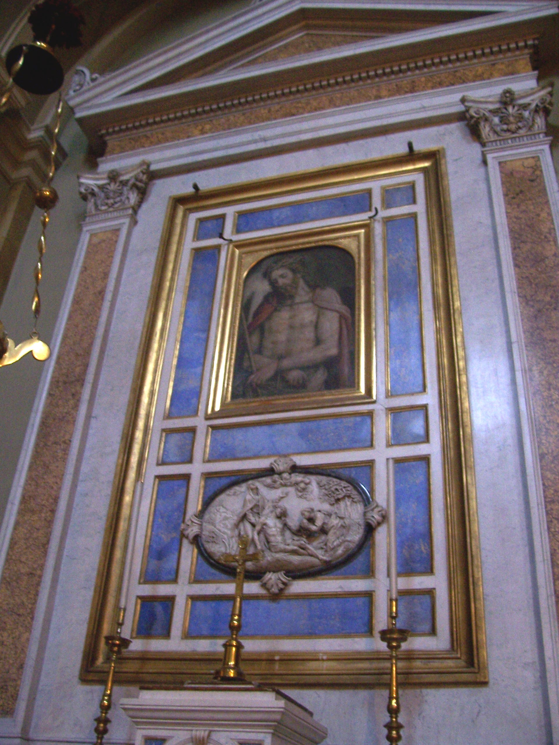 sant'alessandro (brescia) foppa.jpg